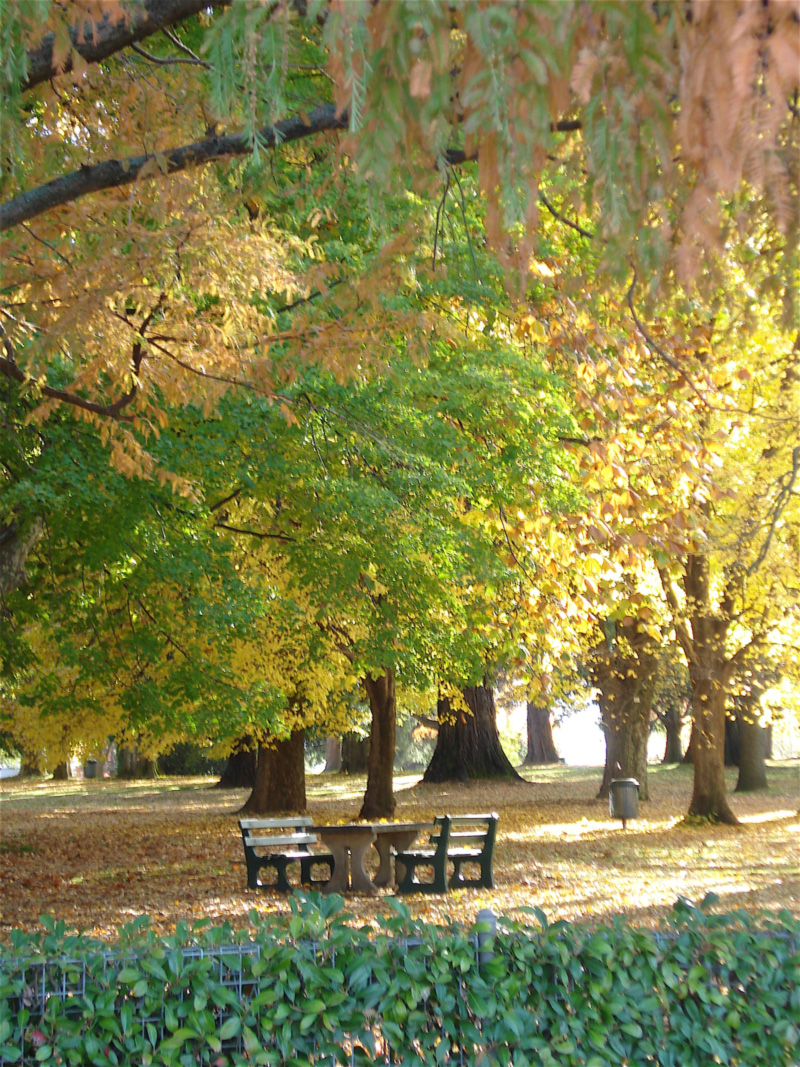 Cook Park